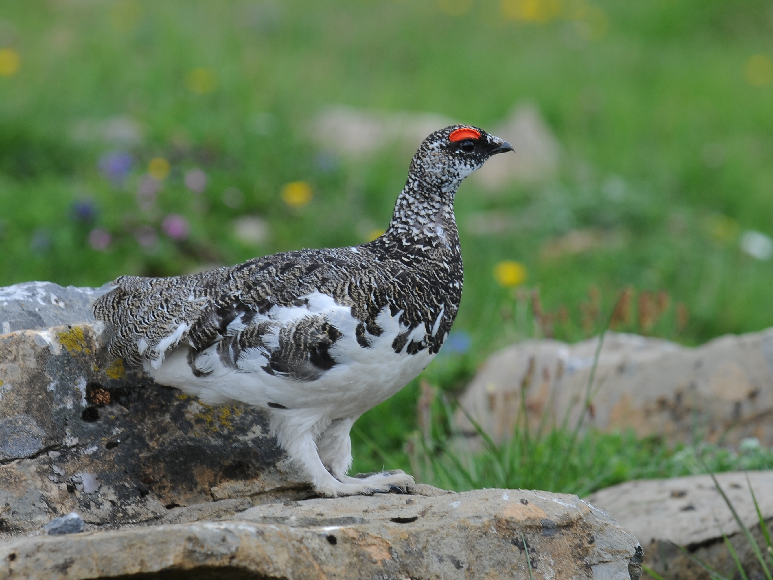 Lagopus muta